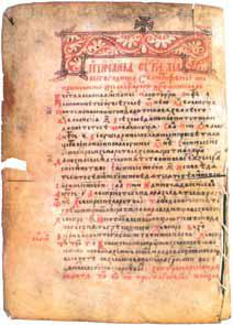 Фрагмент от среднобългарския книжовен паметник Карпински апостол.